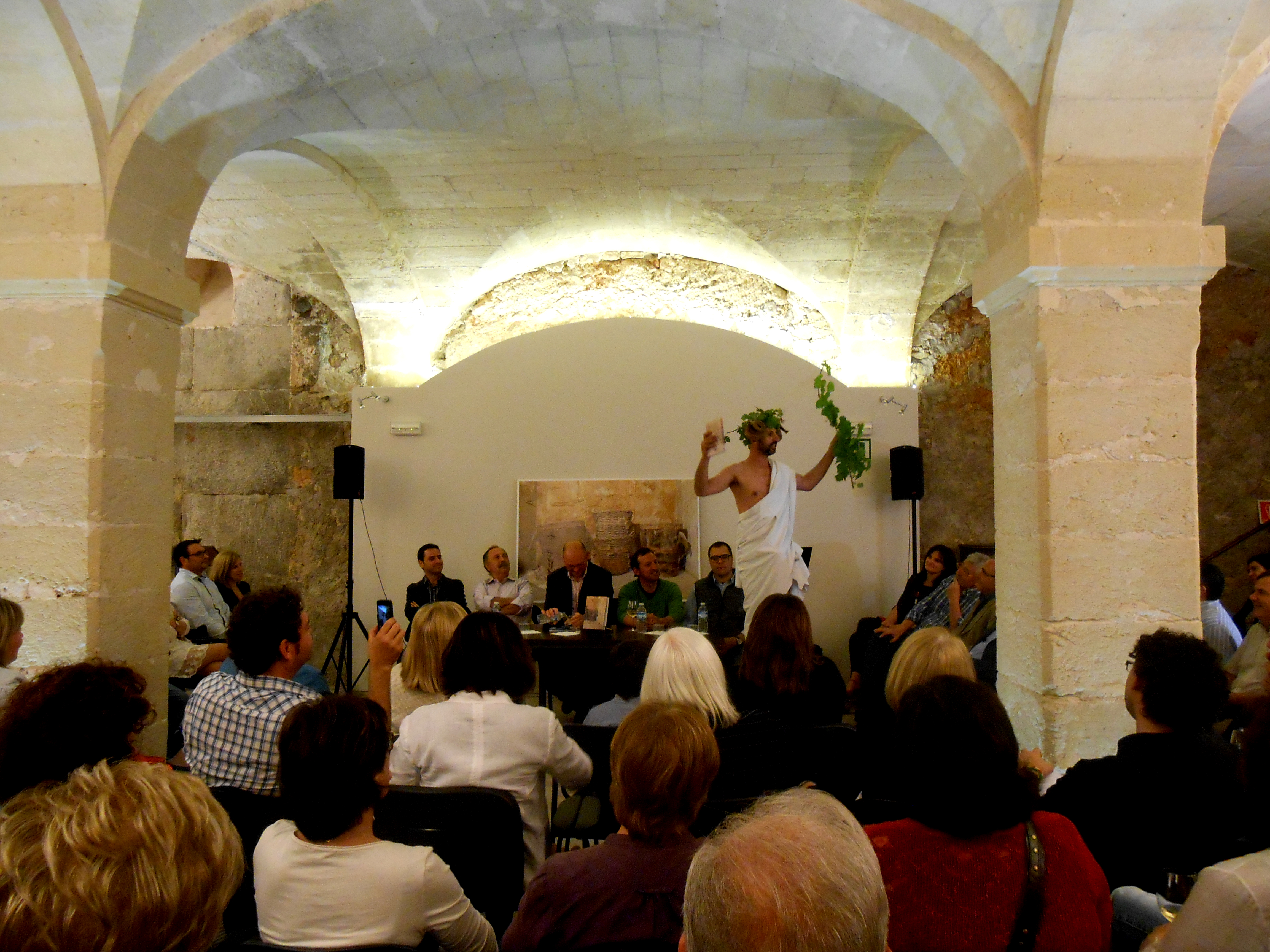 Presentació d'un llibre a la sala d'actes de la Institució Pública Antoni M. Alcover